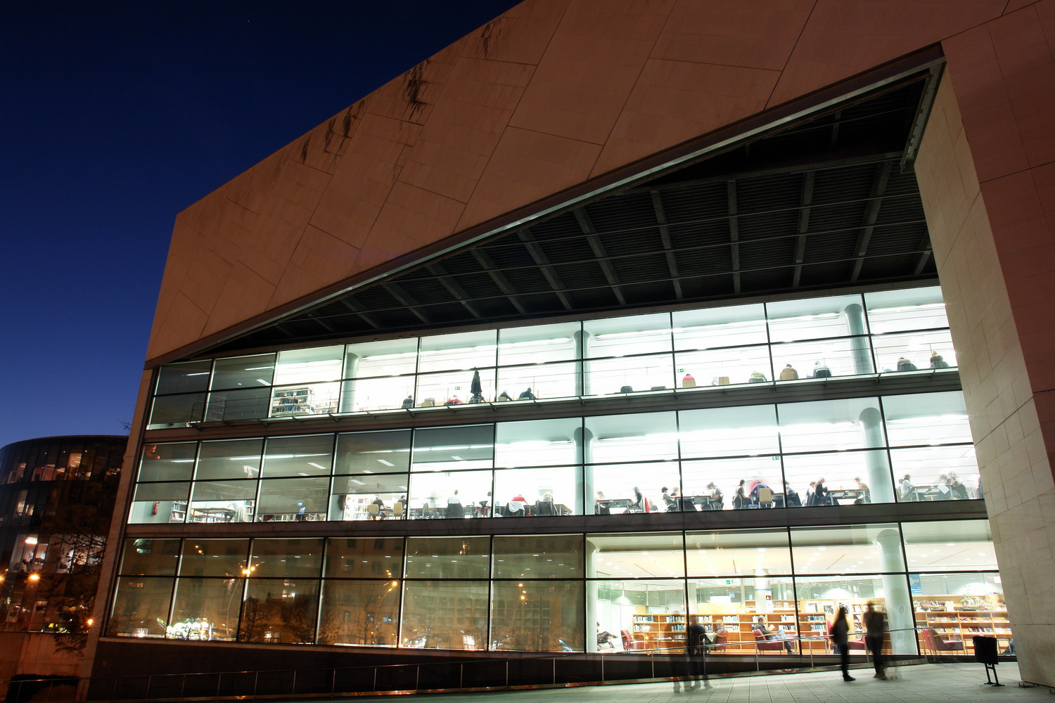 VIsió nocturna de la BRGF